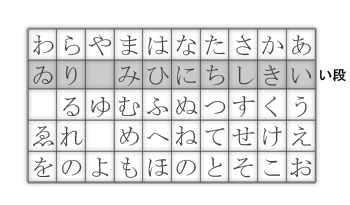 い段在日語五十音圖中的位置。